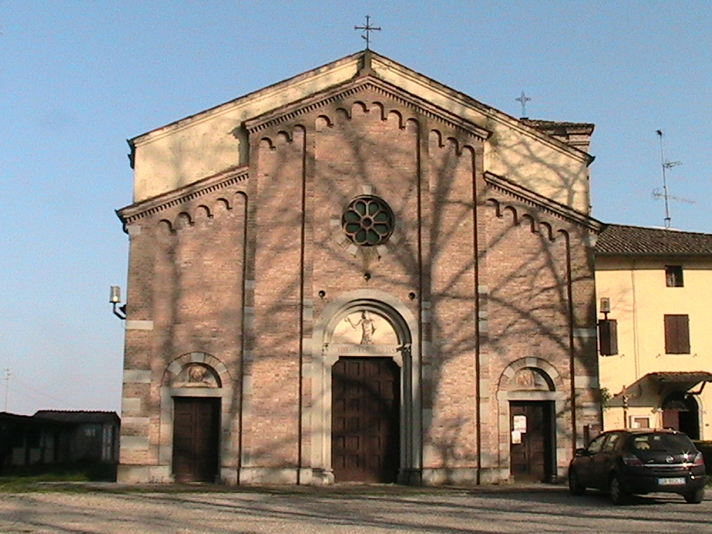 Gainago (Torrile) - pieve di San Giovanni Battista